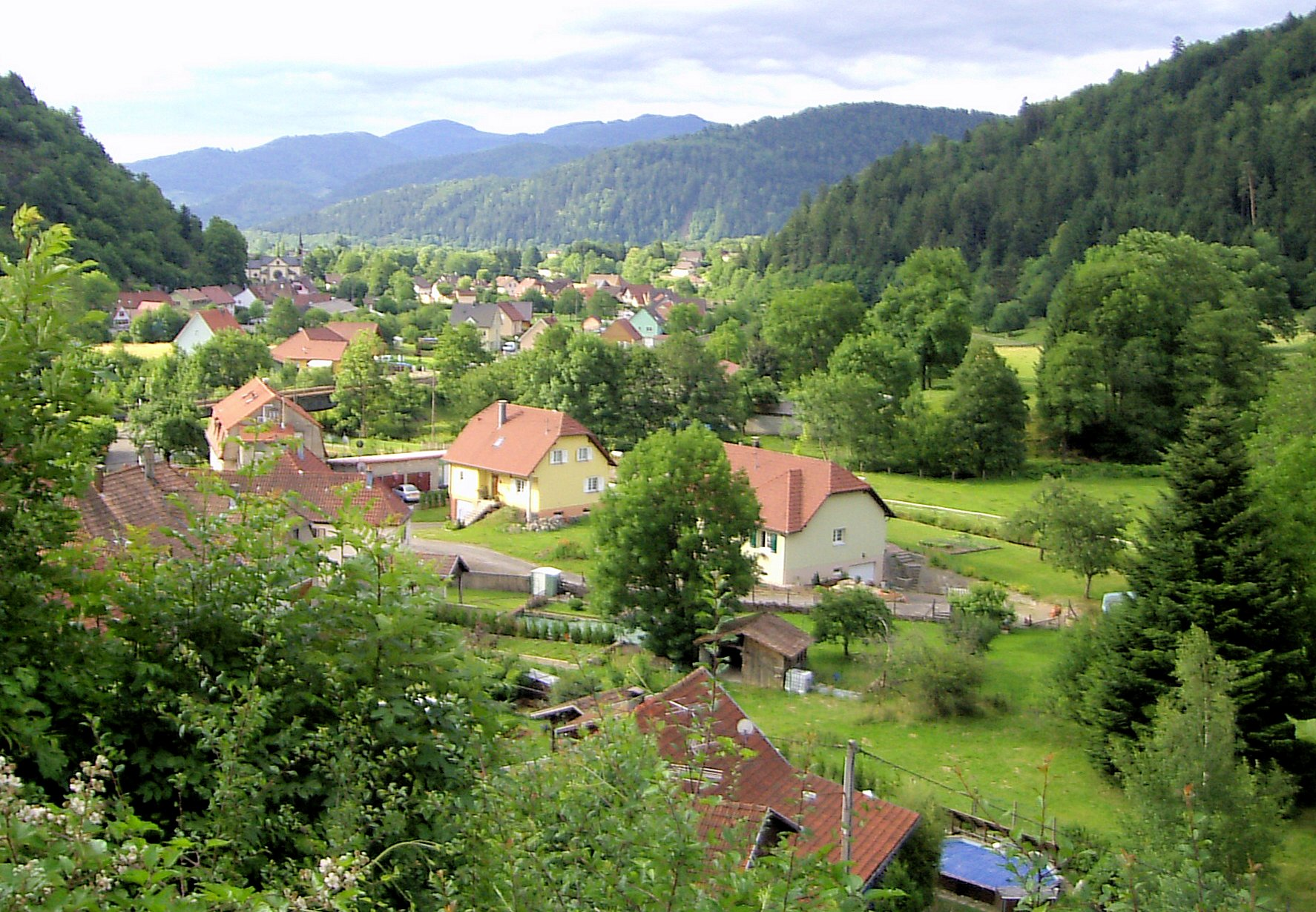 Oderen, Vallée de la Thur